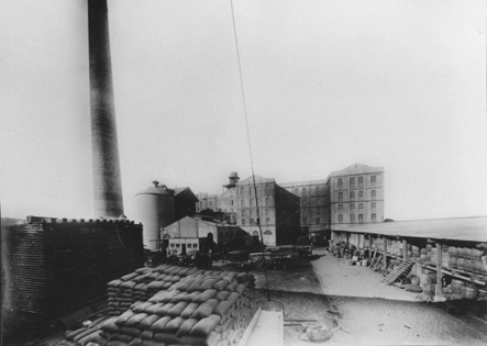 Refinería de Rosario, donde se asesinó al primer martir del movimiento obrero argentino en 1901.